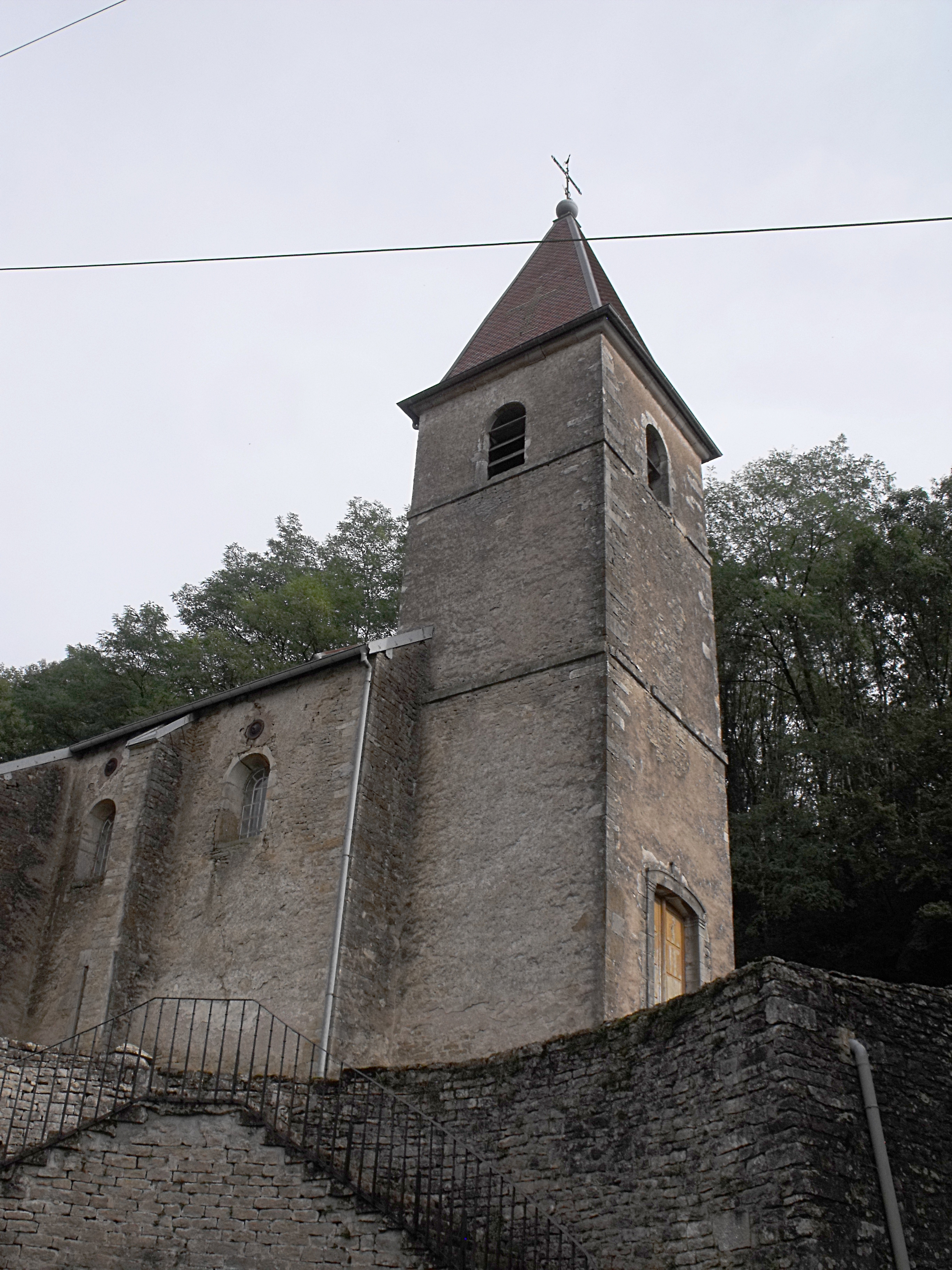 Eglise de Rognon, Doubs, France